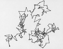 Brauno judėjimas